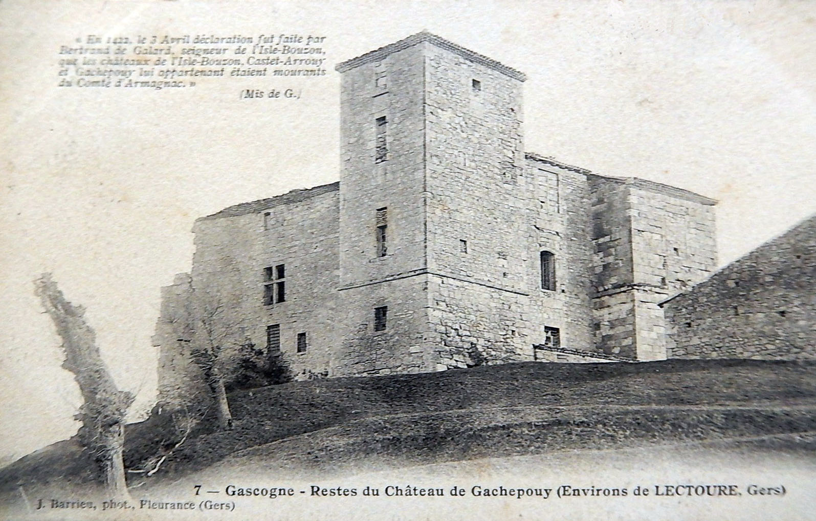 Château de Gachepouy, Castet-Arrouy, Gers, Occitanie, France.Carte postale ancienne montrant le château dans son état au début du XXe siècle.